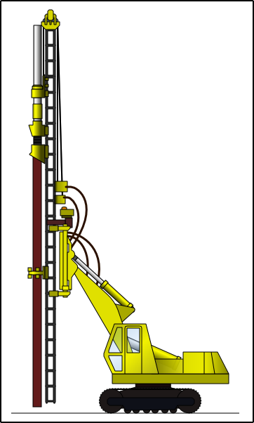 Beranidlo